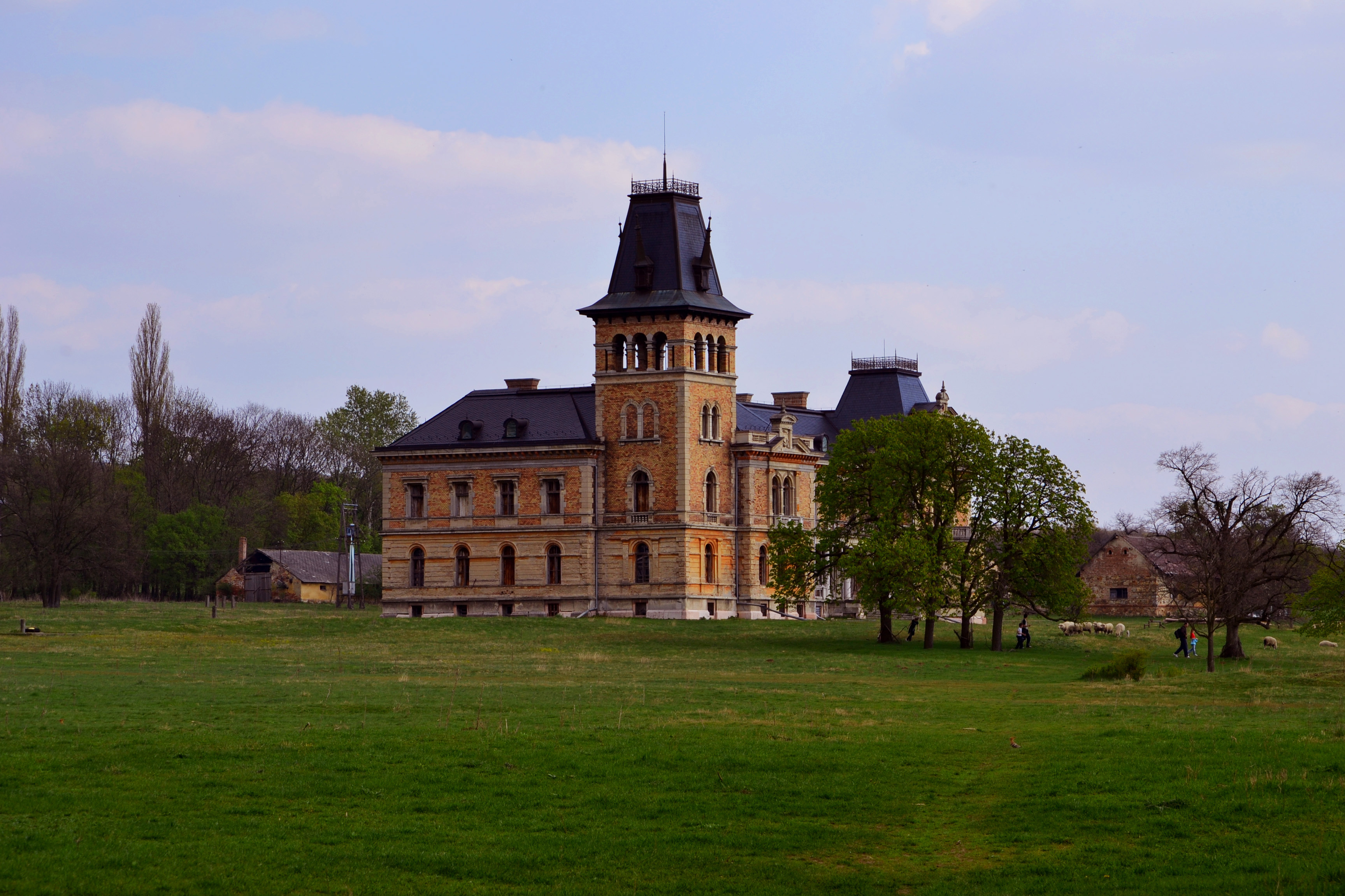 Kégl-kastély (angol)parkja (Székesfehérvár, Csalapuszta)